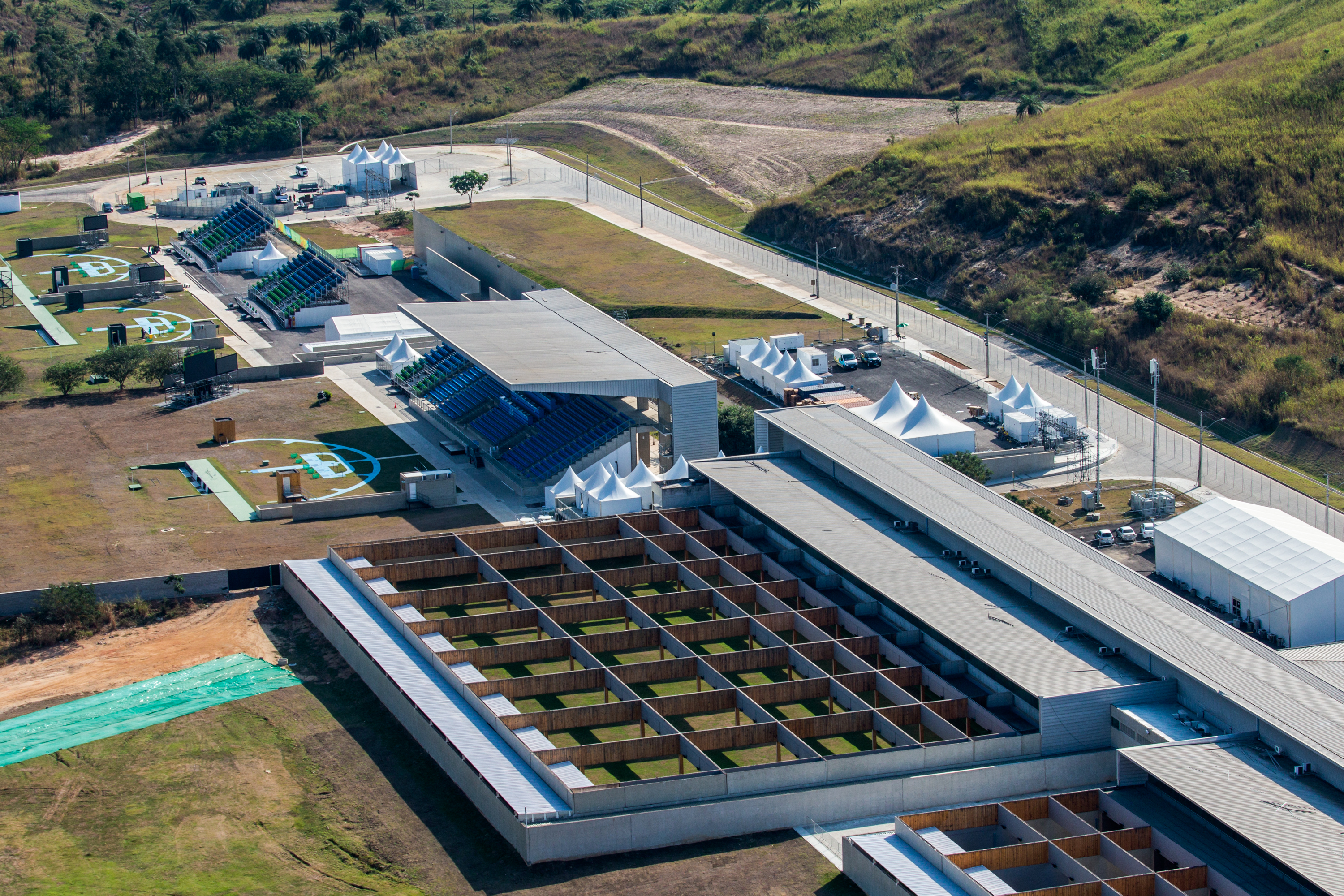 Centro Nacional de Tiro Esportivo